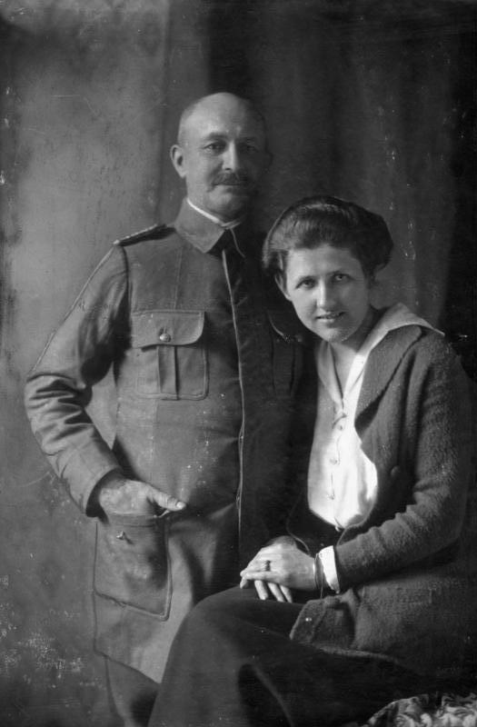 Paul v. Lettow-Vorbeck, Martha v. Lettow-Vorbeck Generalmajor v. Lettow-Vorbeck und seine Gemahlin, geb. Wallrath. v. Lettow-Vorbeck, der ruhmgekrönte Verteidiger Deutsch-Ostafrikas, stellt ein Freikorps auf, das dem Garde-Kavallerie-Schützenkorps zugeteilt wird. 5. Mai 1919 2891-19 [Paul von Lettow-Vorbeck und seine Ehefrau Martha, geborene Wallroth.- Atelieraufnahme] Abgebildete Personen: Lettow-Vorbeck, Paul von: General der Schutztruppen in Deutsch-Ostafrika, Deutschland